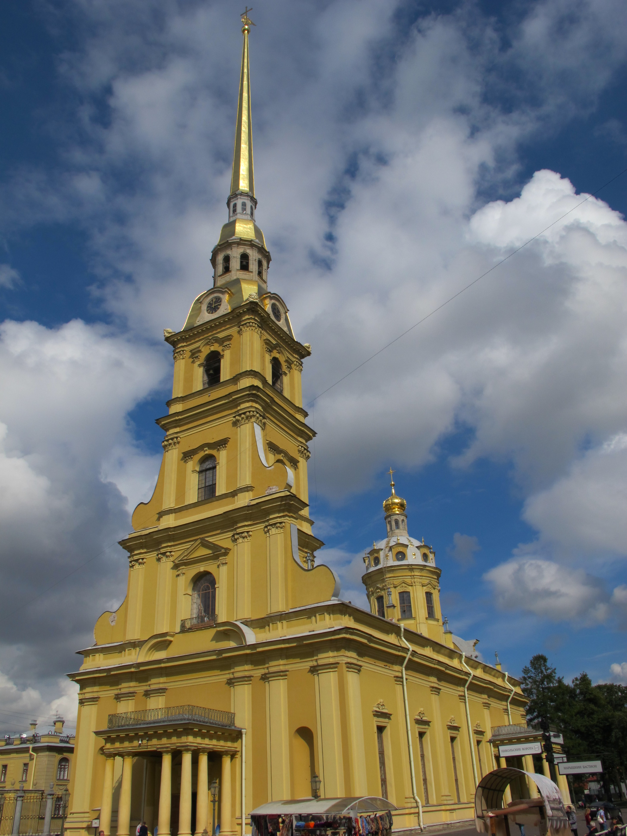 Fortezza di pietro e paolo, cattedrale dei santi pietro e paolo